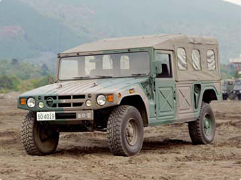 略称：HMV 愛称：疾風（はやて） [乗員]10人 [車両重量]2,640kg [全長]4.91m [全幅]2.15m [全高]2.24m [登板能力]tanθ60% [最高速度]125km/h [エンジン] 水冷4サイクルディーゼル 170ps/3,000rpm [製作]トヨタ自動車 一般道路の高速走行性能に加え、高い最低地上高およびタイヤ空気圧調整装置により、優れた路外機動性能も有する。またランフラットタイヤの採用により、被弾時の走行性能向上している。